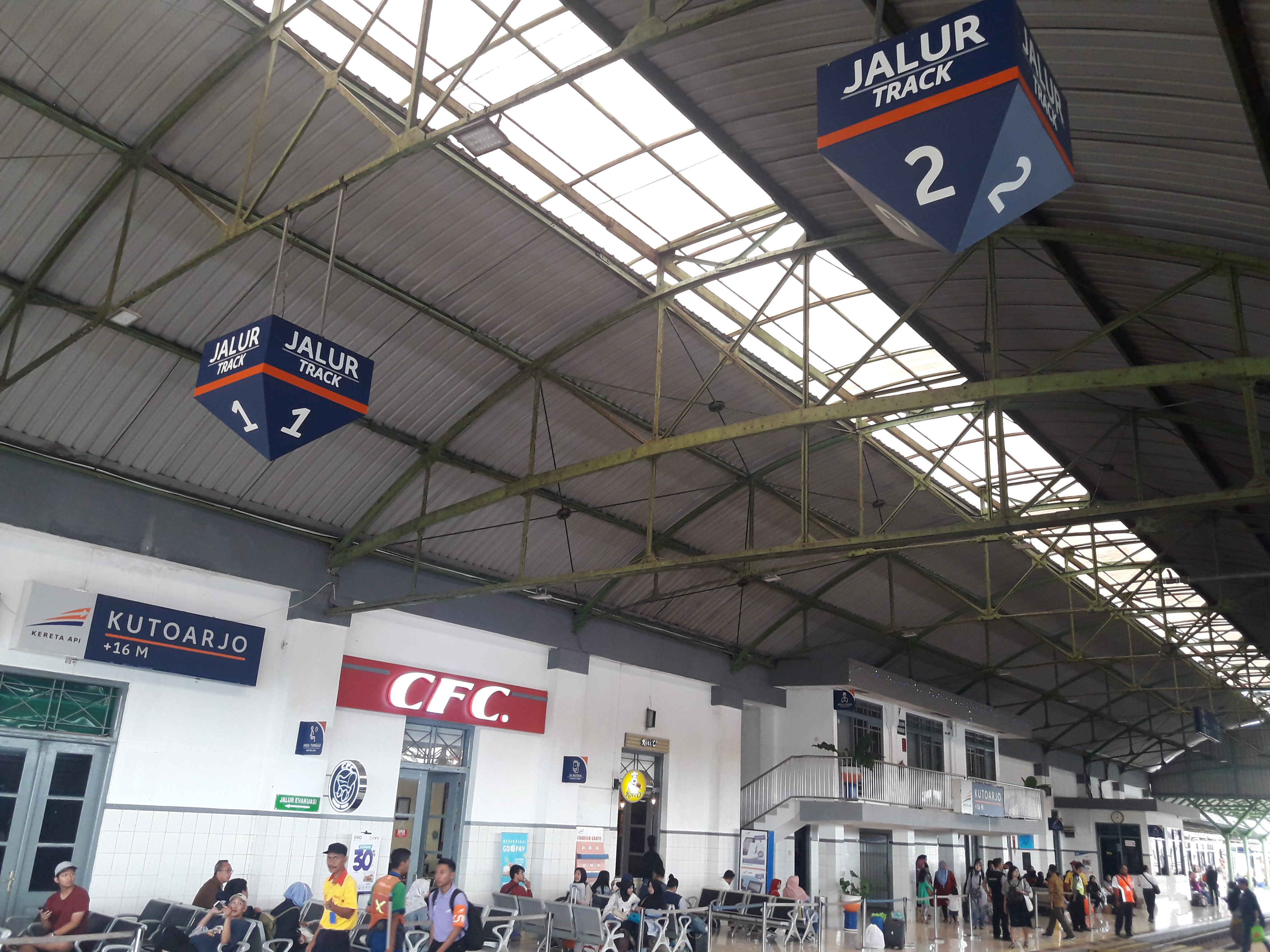 Emplasemen Stasiun Kutoarjo pada 30 Desember 2018.